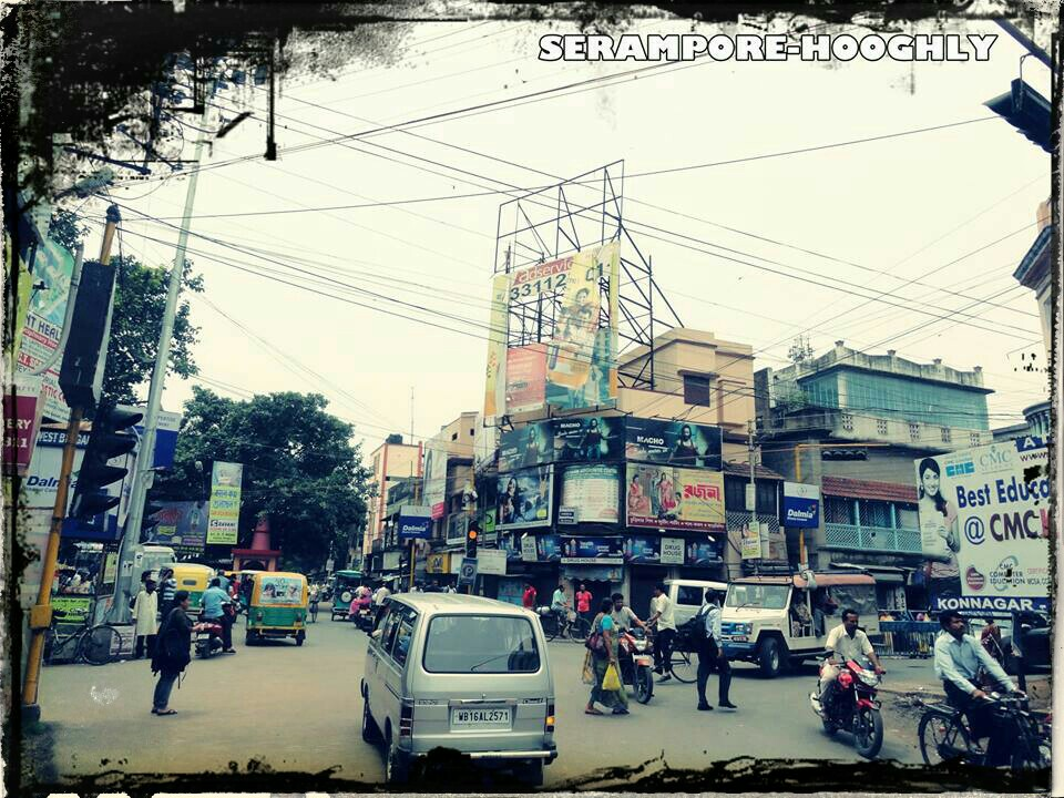 দফ